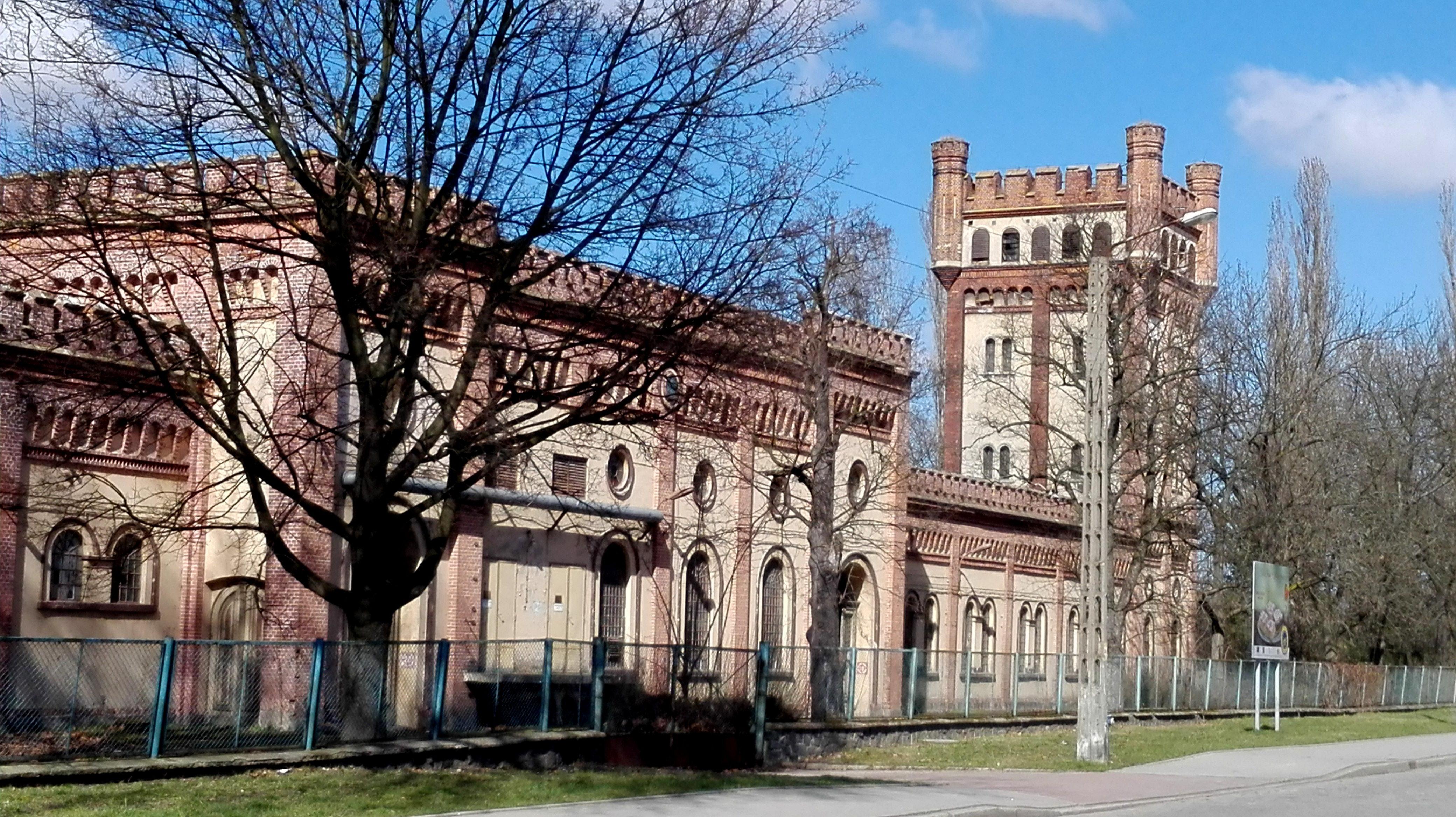 Prudnik, hala produkcyjna i narożna kwadratowa wieża zakończona krenelażem - byłe Zakłady Przemysłu Bawełnianego „Frotex“ S.A.